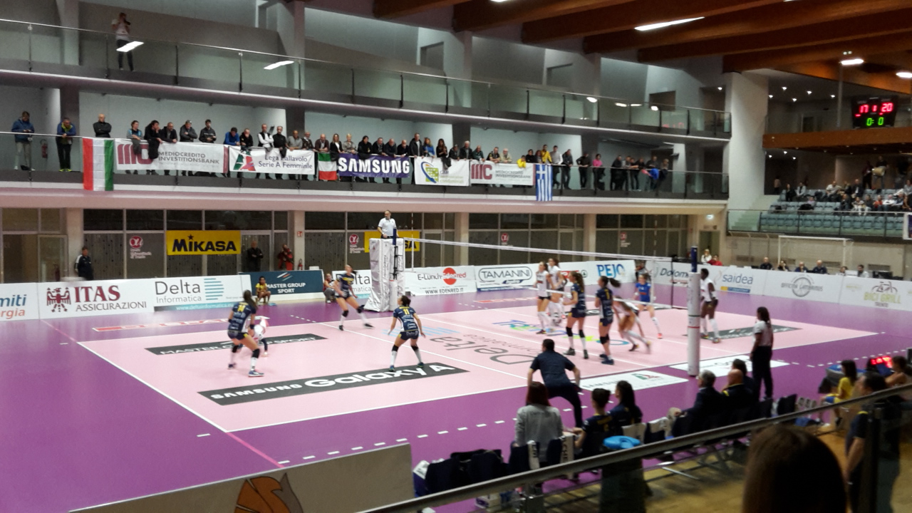 Trentino Rosa 2017-2018